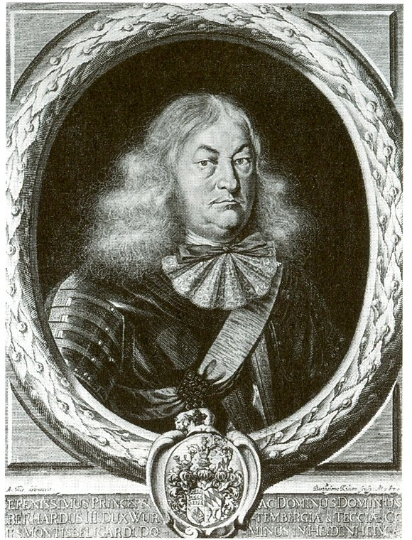 Herzog Eberhard III (1614-1674)